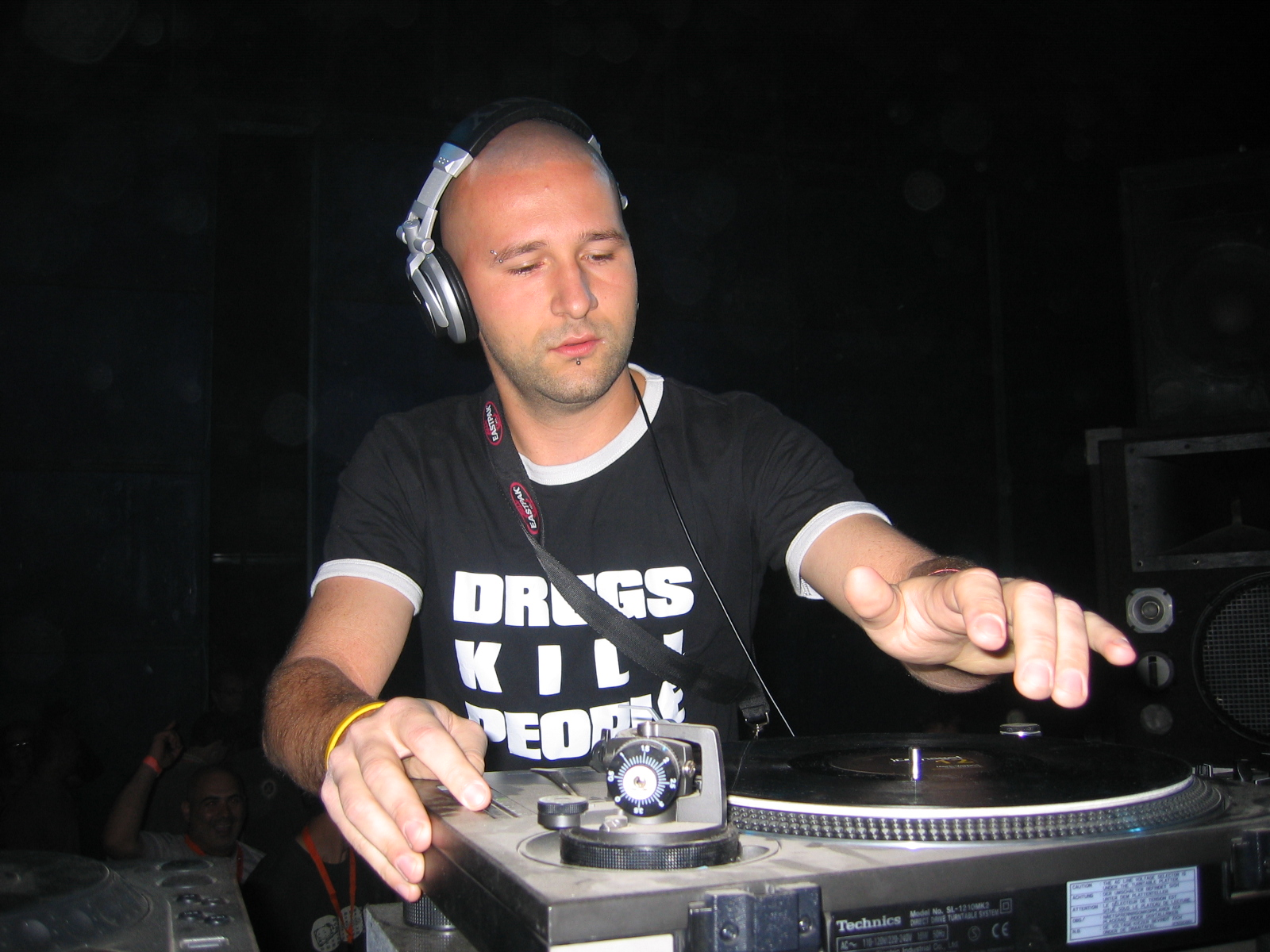 Mario Ranieri @ Paradog, Airport Senica Slovakia